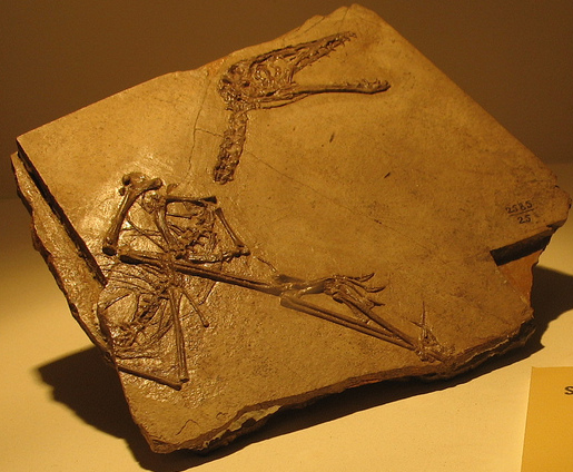 Il tesoro paleontologico della Russia